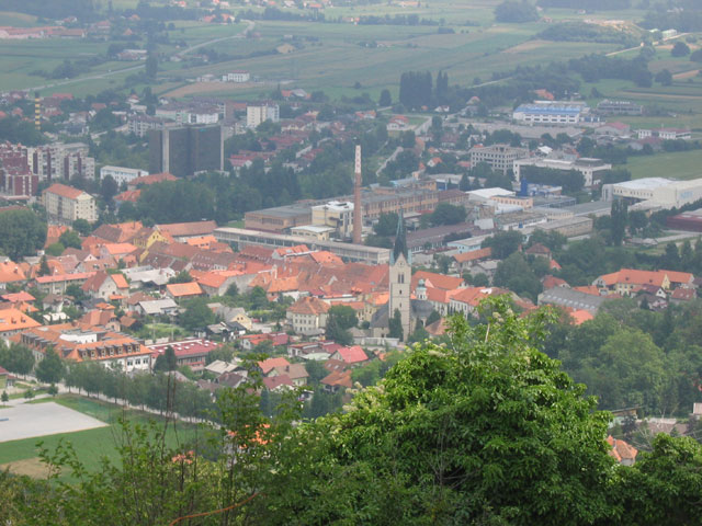 Trg Slovenske Konjice z grada Dovoljenje: GFDL Lastnik: plp (Foto) Datum: sl:2004 Kraj: Slovenske Konjice, Slovenija